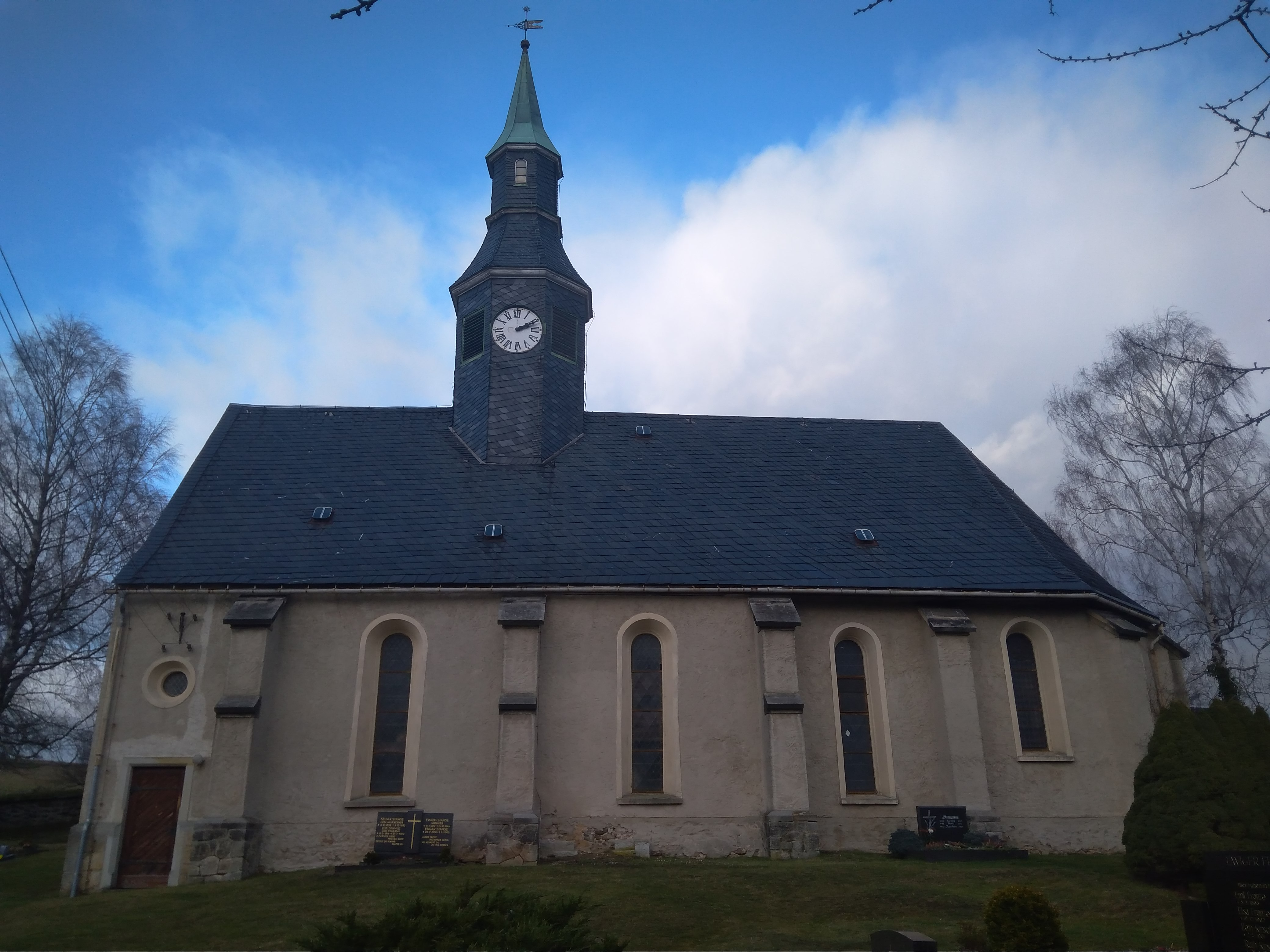 Vesnický kostel v Ehrenbergu, město Hohnstein